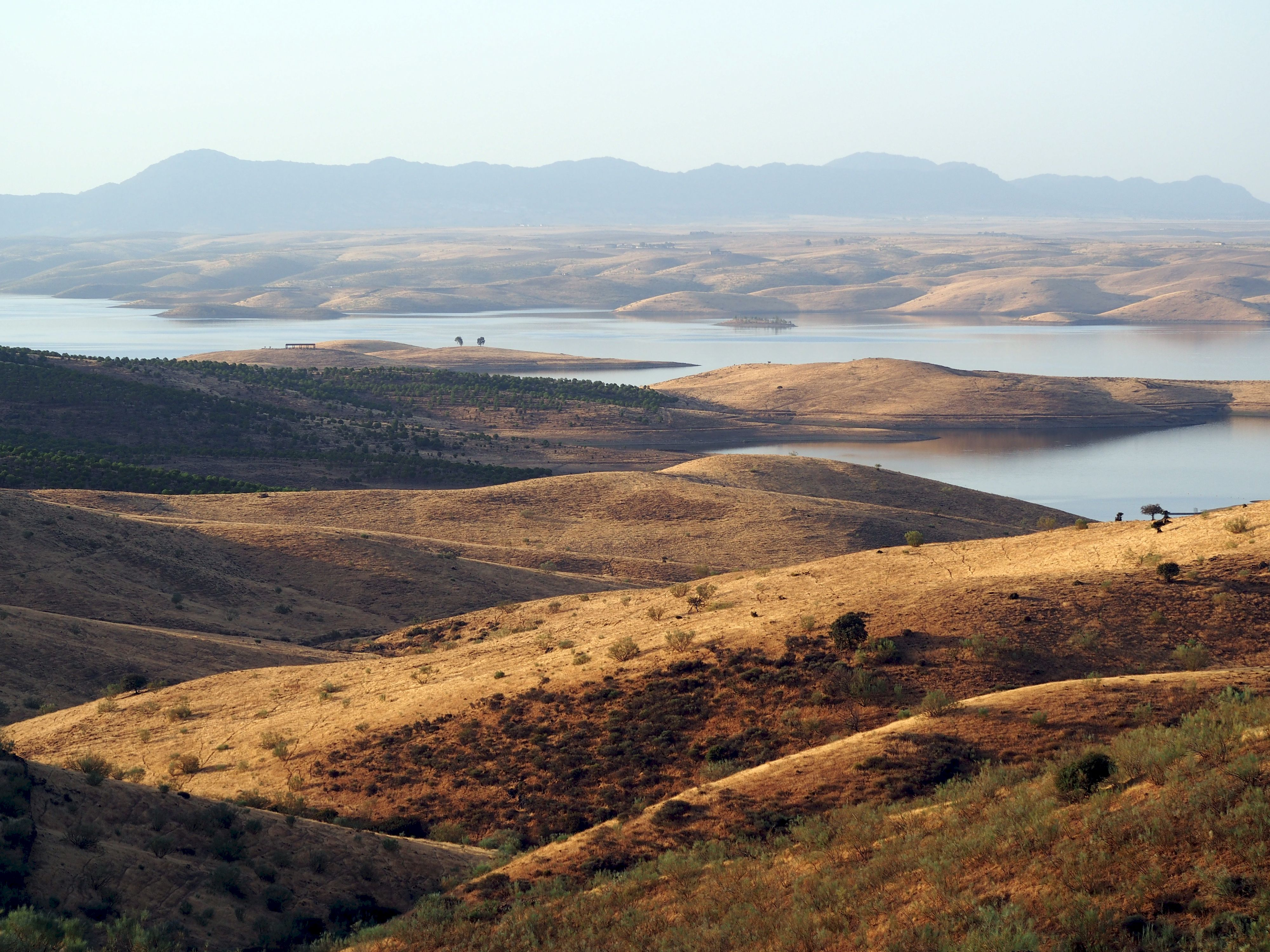 Extremadura